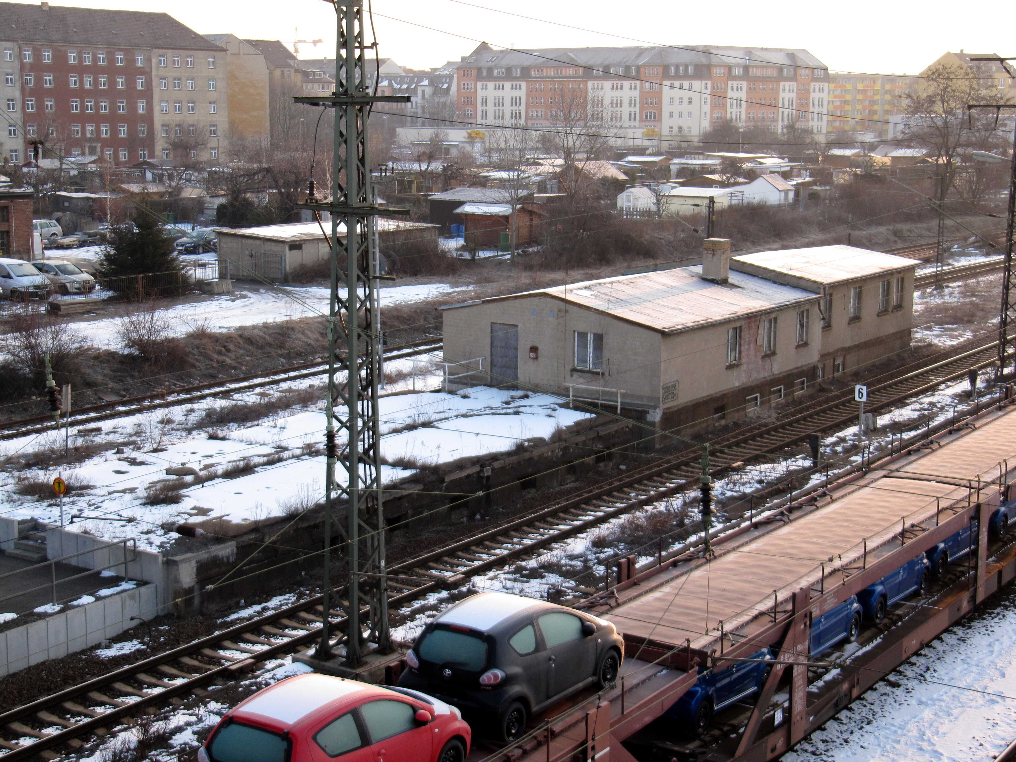 Kellergeschoss des im Zweiten Weltkrieg zerstörten Empfangsgebäudes des Bahnhofs Dresden-Friedrichstadt in Insellage. Auf dem östlichen Teil des Kellergeschosses befindet sich inzwischen ein Dienstgebäude.